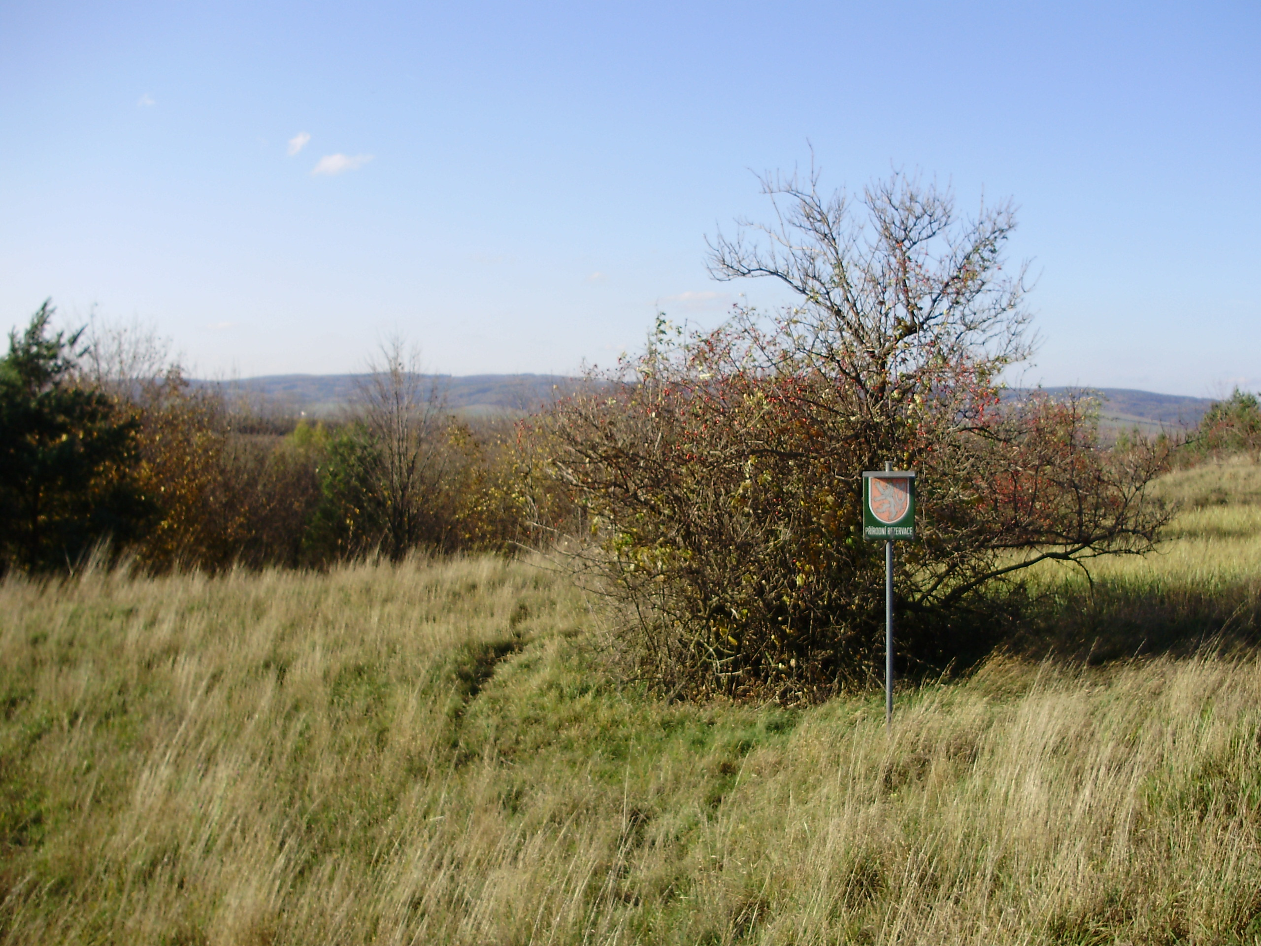 Rezervace Stepní stráň u Komořan - (Vyškov- Czech Republic)